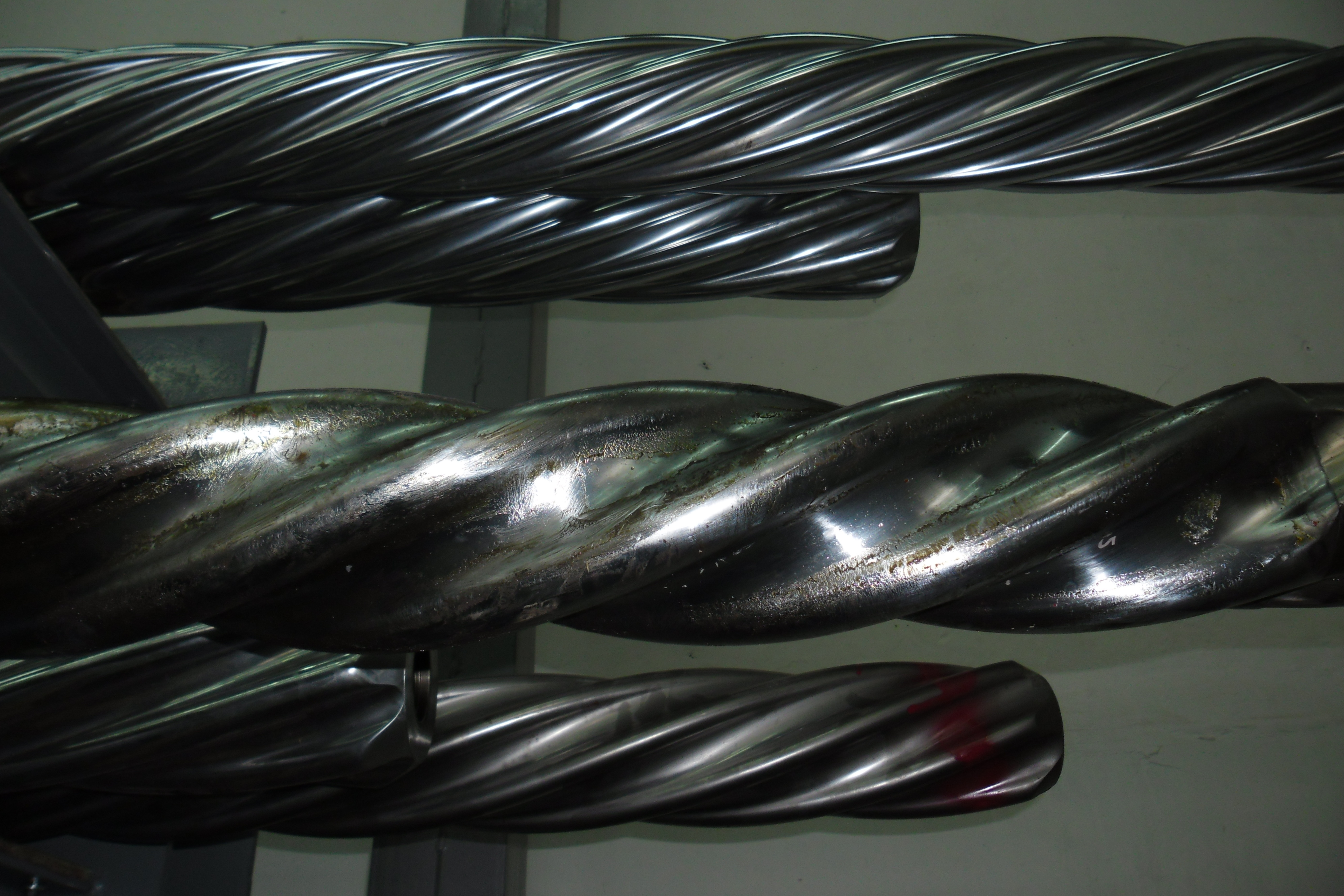 Фото